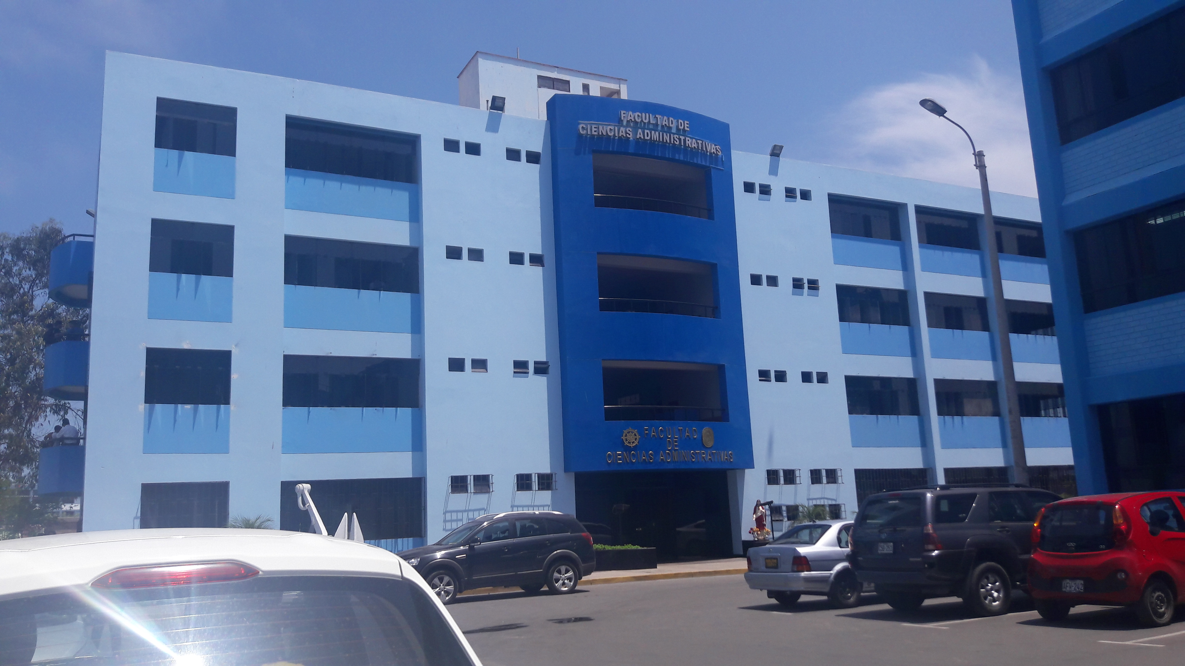 UNAC-Facultad de Ciencias Administrativas